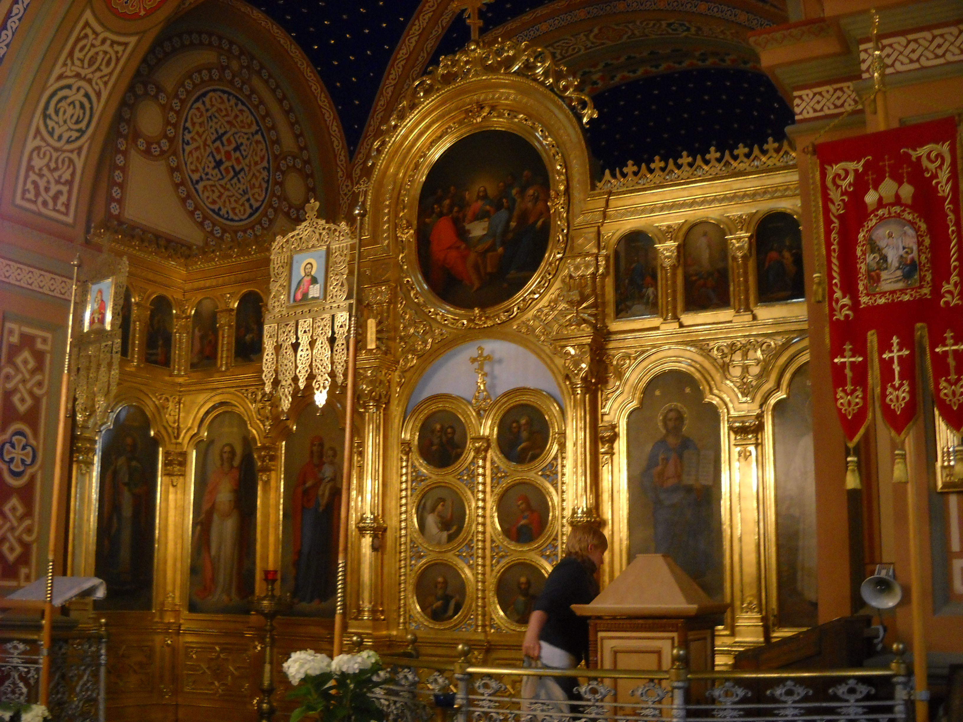 Ikonostas cerkwi w Piotrkowie Trybunalskim